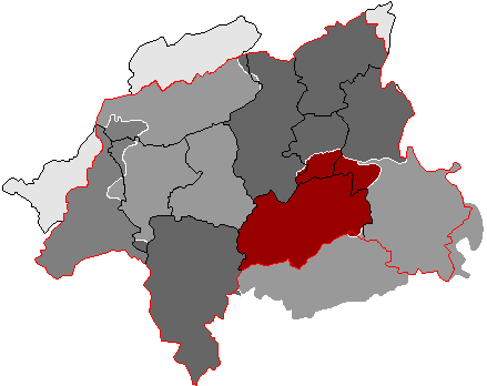 Gebiet der Stadt Ronsdorf und die Entstehung Wuppertals